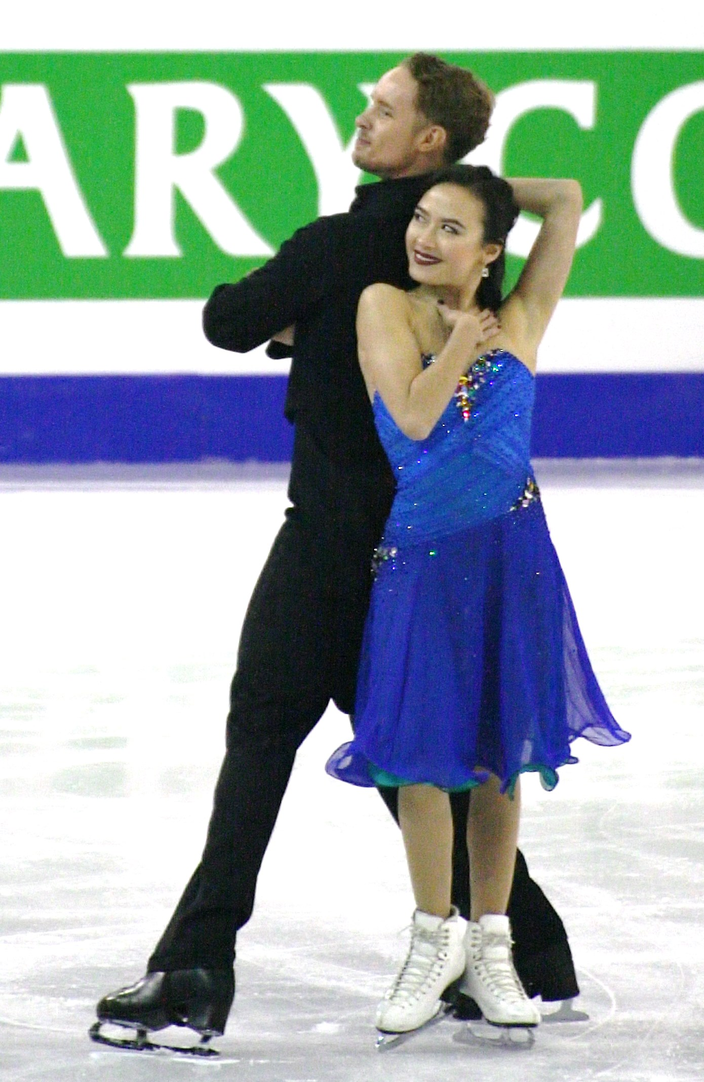 Мэдисон Чок и Эван Бейтс (США) на финале Гран-при по фигурному катанию 2015-2016.